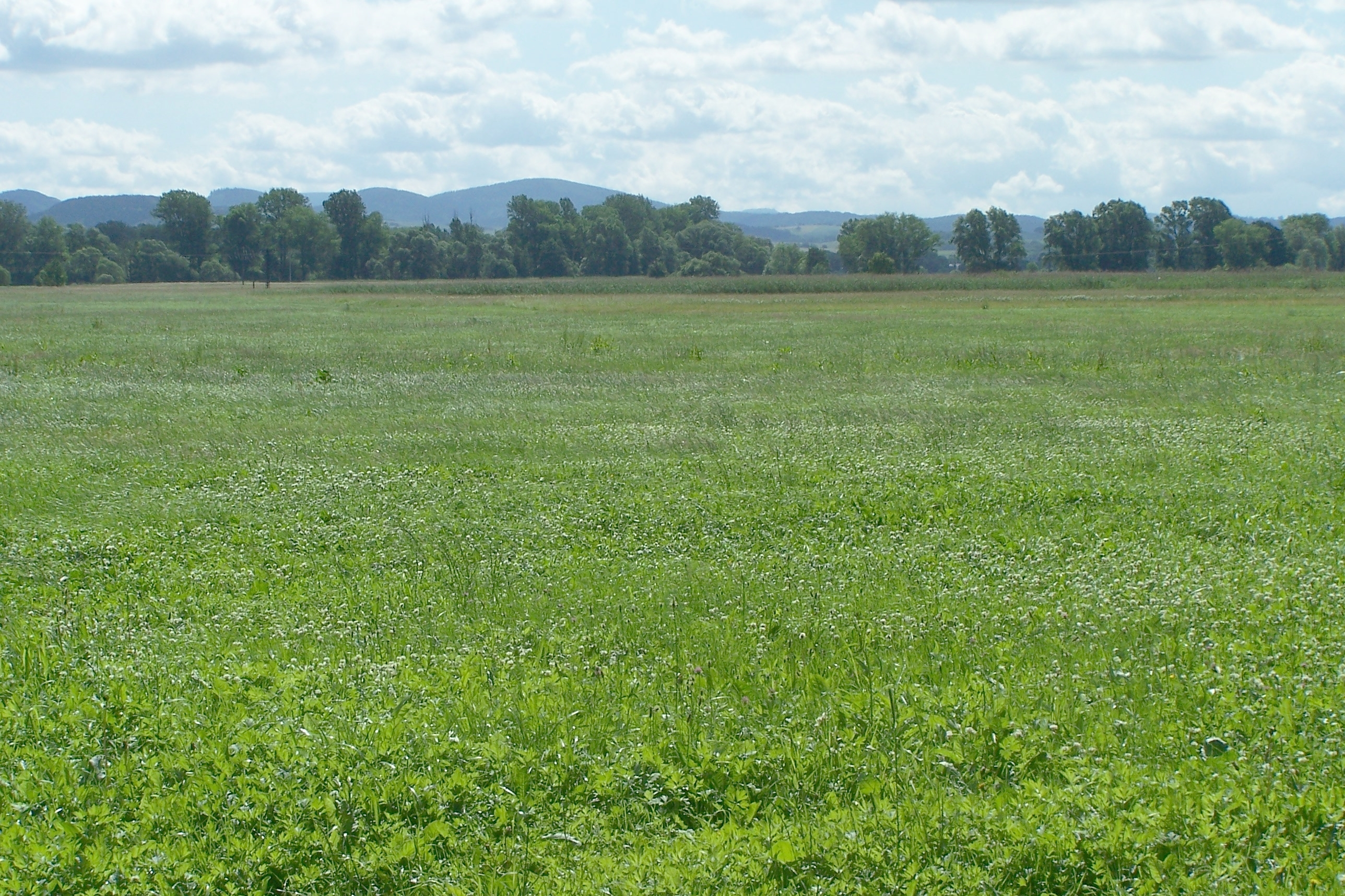 Ansichten aus dem Stadtteil Allendorf in Bad Salzungen.